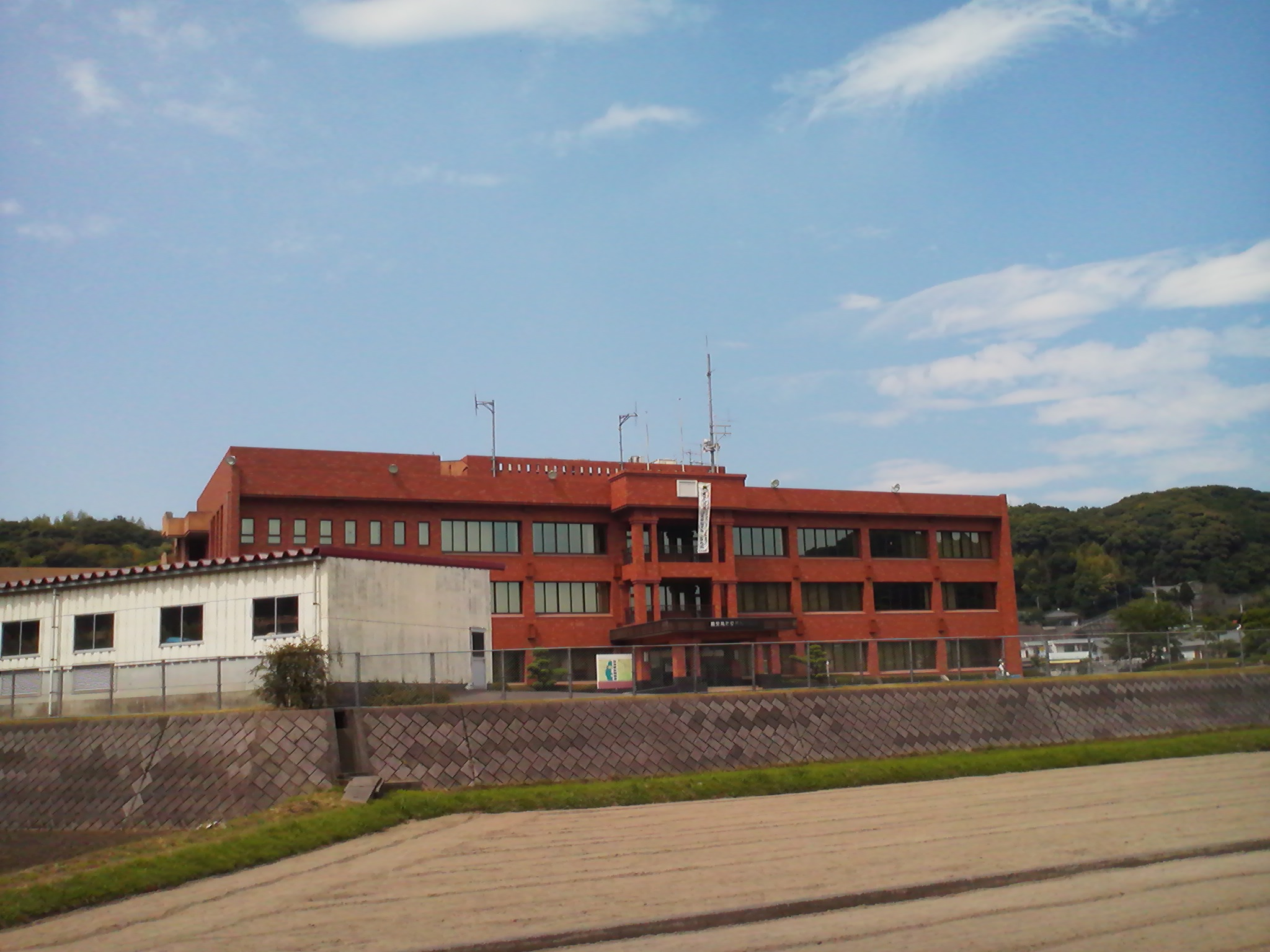 鹿児島市役所松元支所の外観。